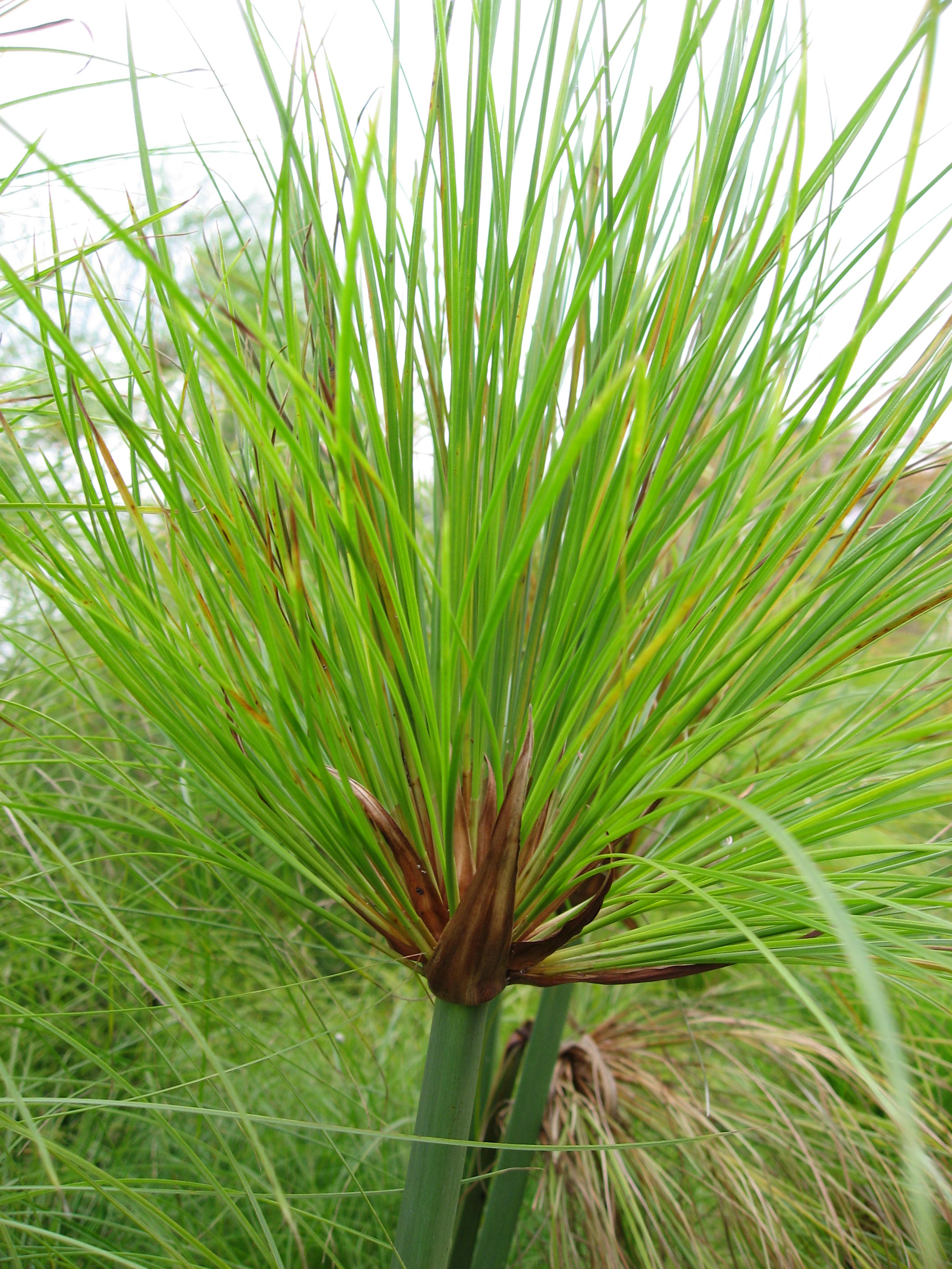 Cyperus papyrus in Parc floral de Paris Map: 48° 50' 19" N 2° 26' 33" E